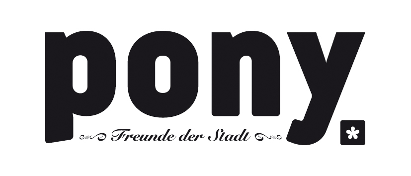 Logos des Magazins pony aus Göttingen